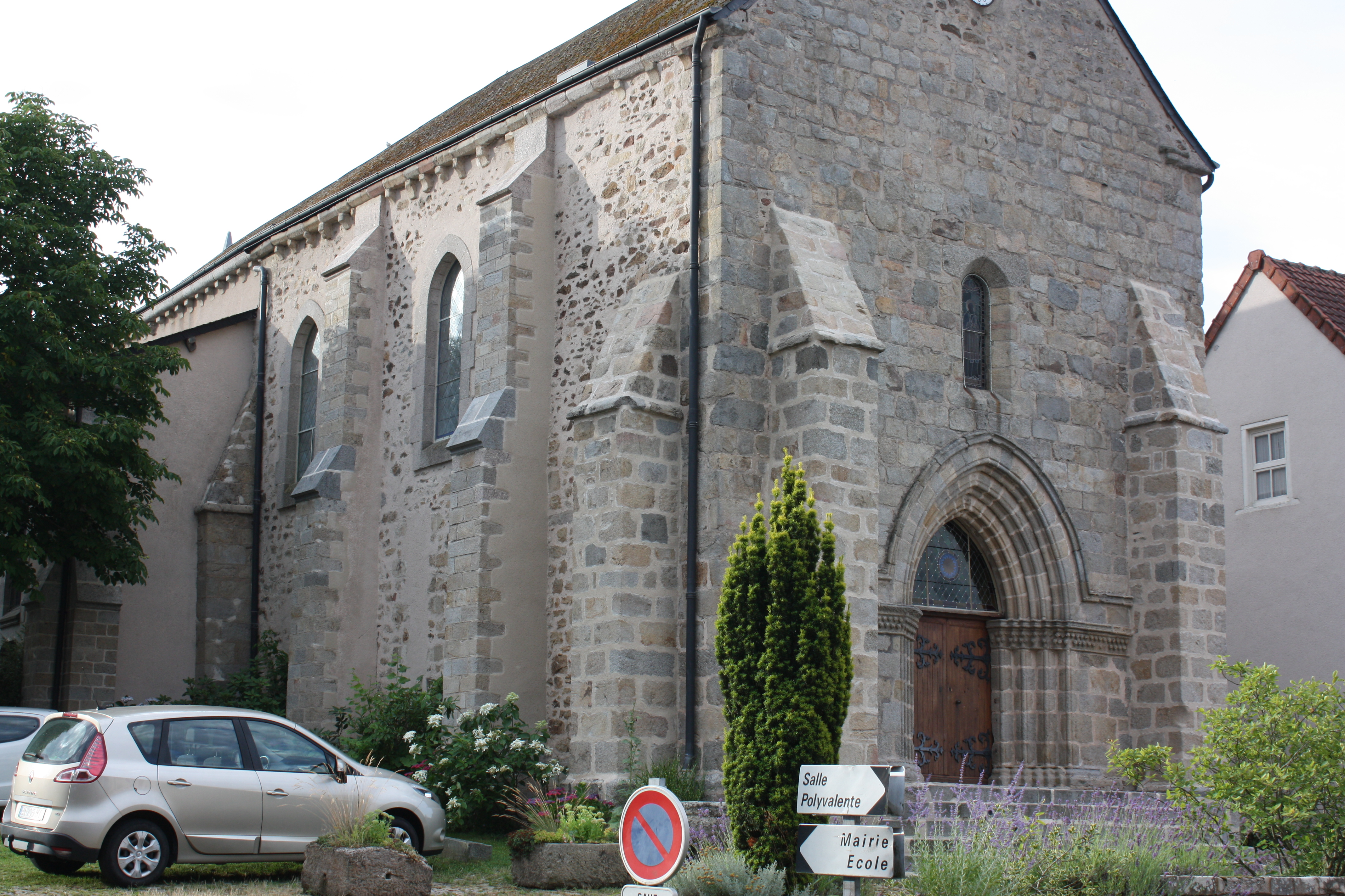 Lépaud, l'église du Nord-Ouest